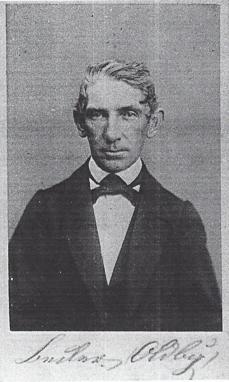 Signierte Porträtfotografie von hermann Heinrich Becker (1816-1898)